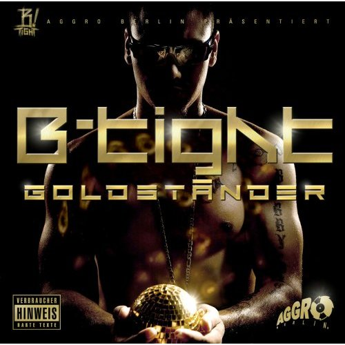 Cover des Albums „Goldständer“ (Premium Edition)